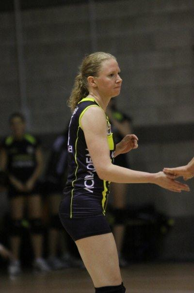 Alice Blom, pallavolista neerlandese, gioca nel ruolo di schiacciatrice